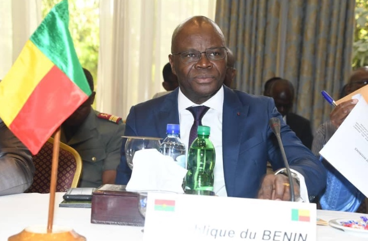 Aurélien Agbénonci, ministre des Affaires étrangères du Bénin, à Ouagadougou, le 16 octobre 2018. (VOA/Lamine Traoré)